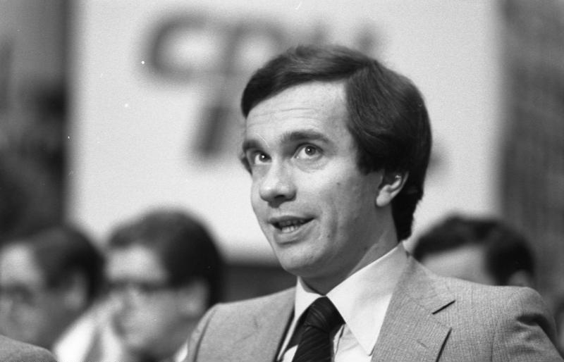 26. Bundesparteitag der CDU in der Friedrich-Ebert-Halle in Ludwigshafen